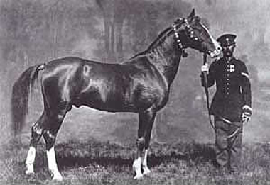 Жеребец Альетмез